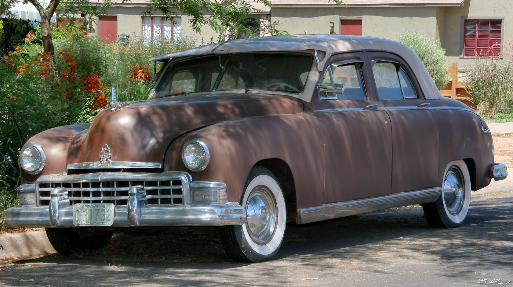 1949 Frazer 4d sedan Phoenix, AZ